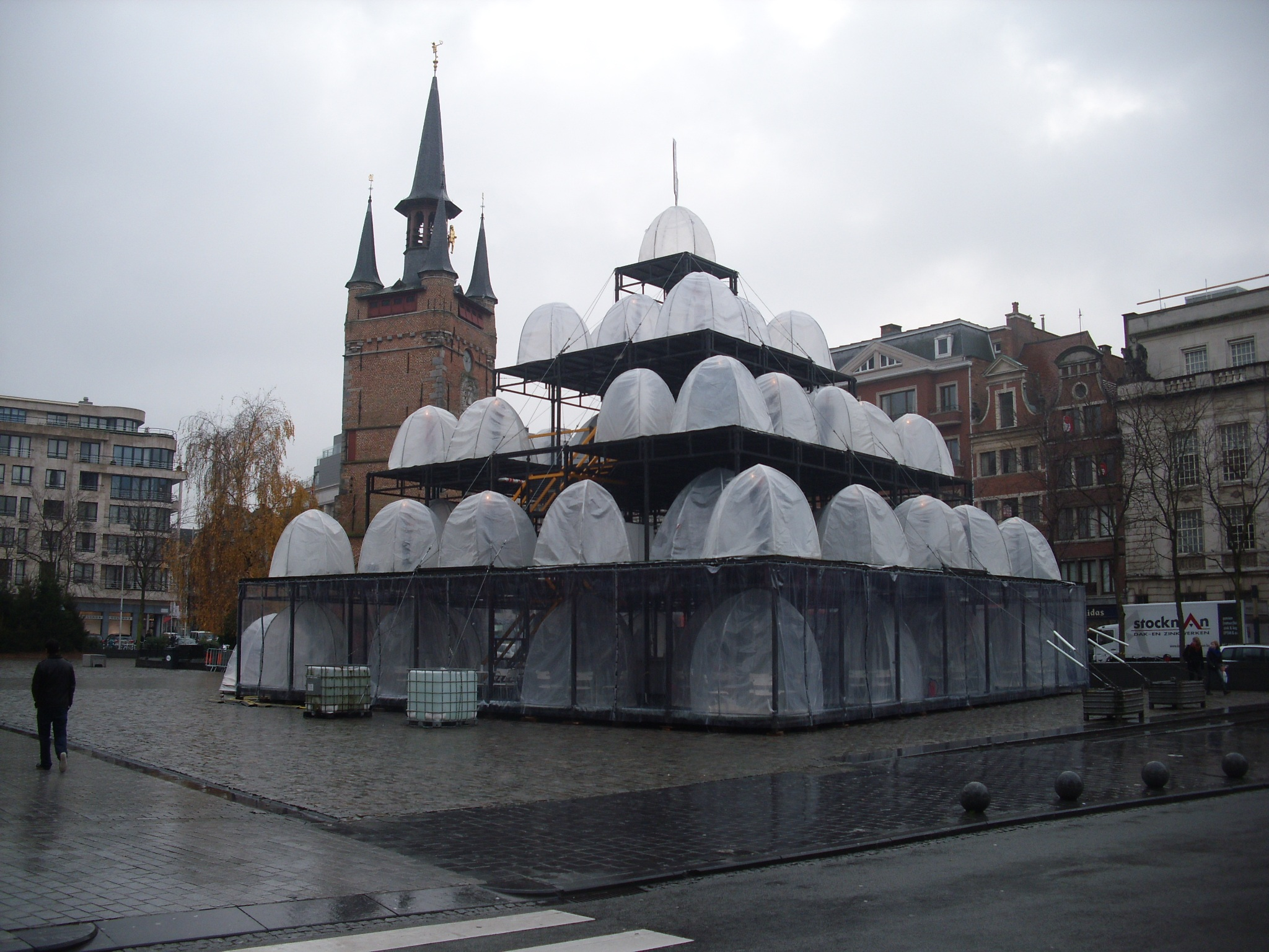 Wensenboom 2012 - Kortrijk - West-Vlaanderen - België